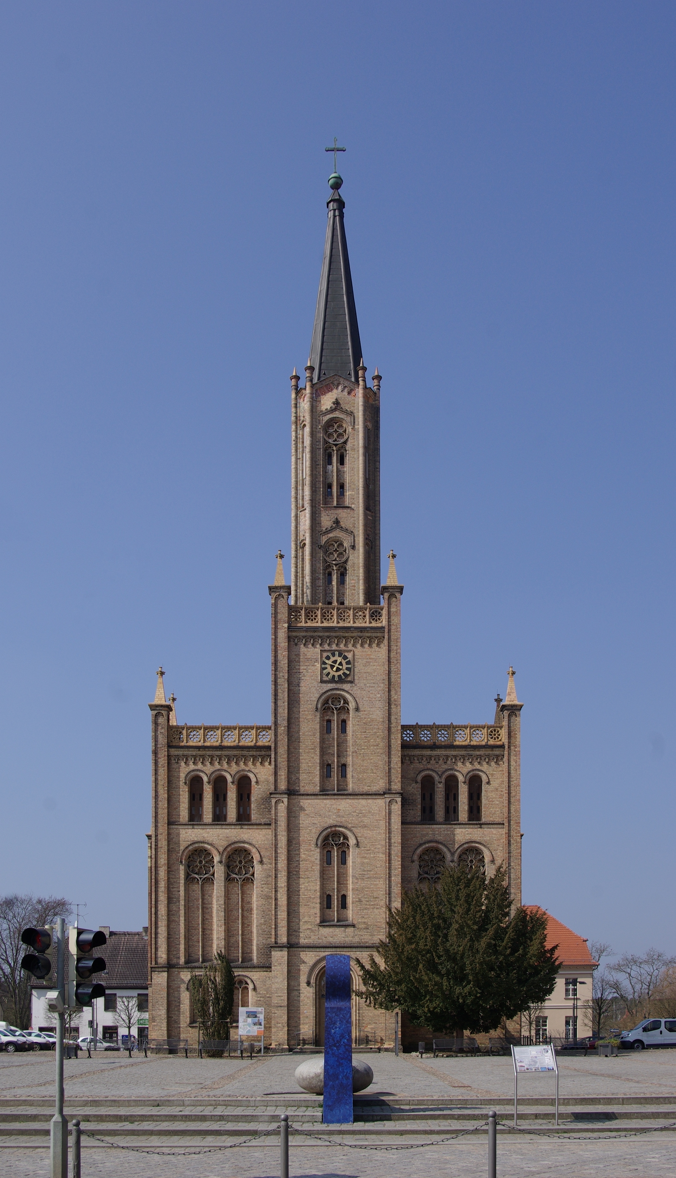 Fürstenberg/Havel in Brandenburg. Die Stadtkirche am Marktplatz in der Mitte des Ortes steht unter Denkmalschutz.